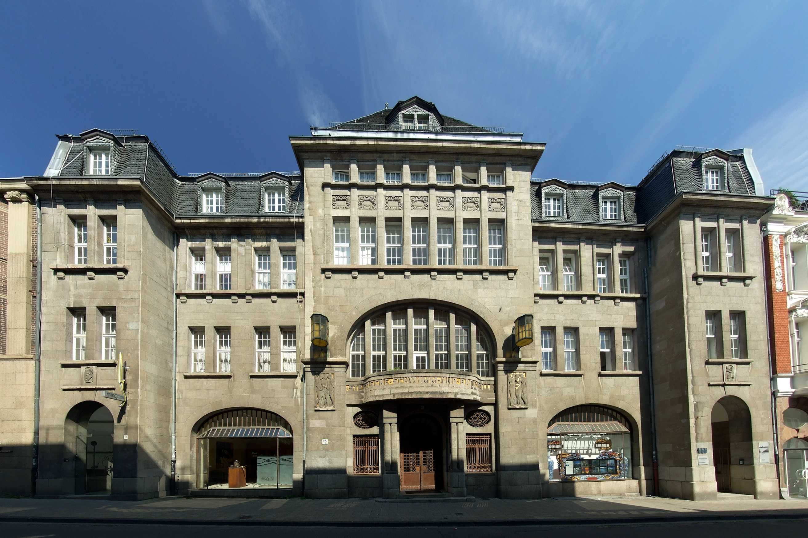 Panorama der Elisabethhalle/Elisenbad in Aachen